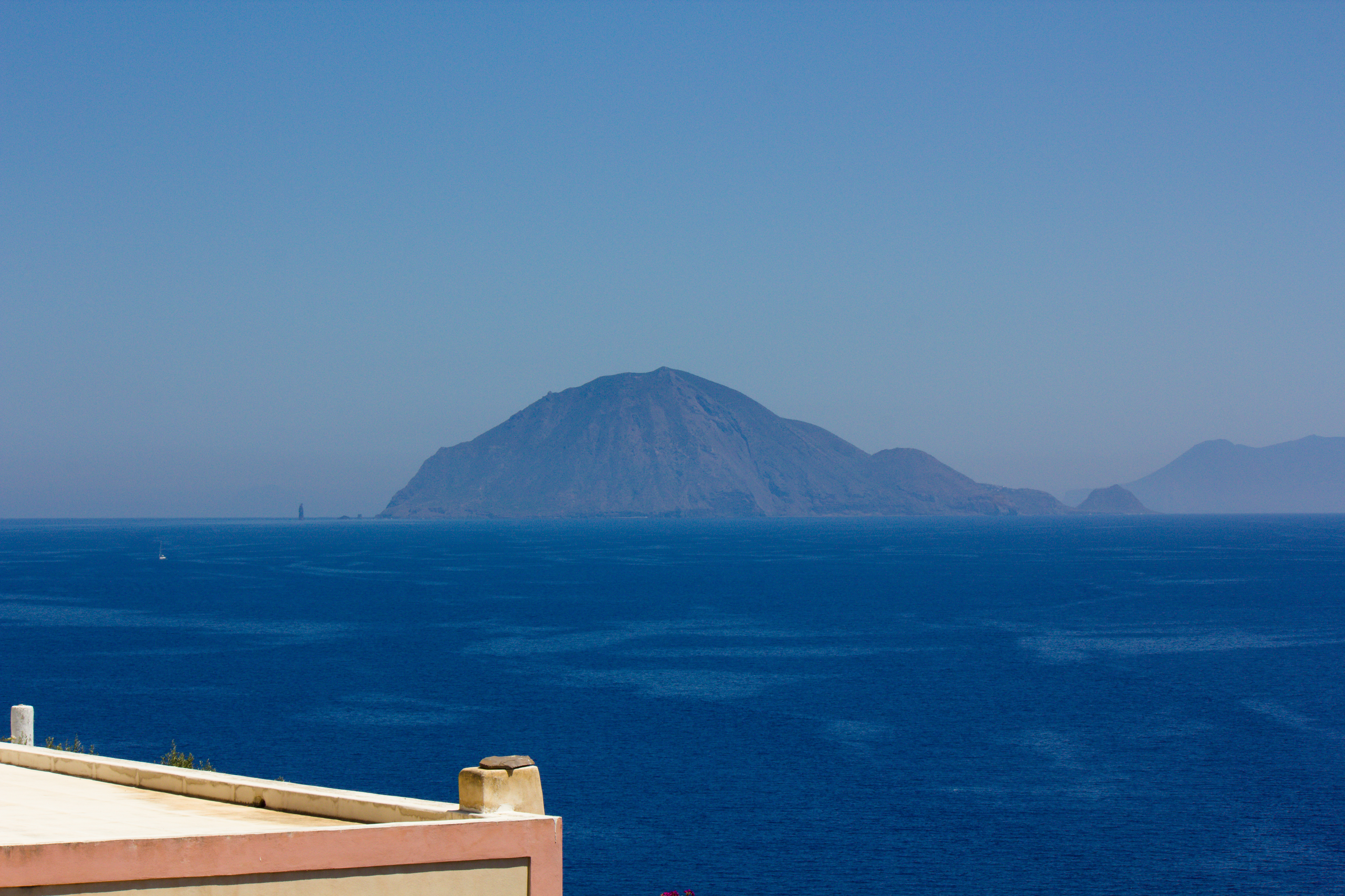 Isole Eolie